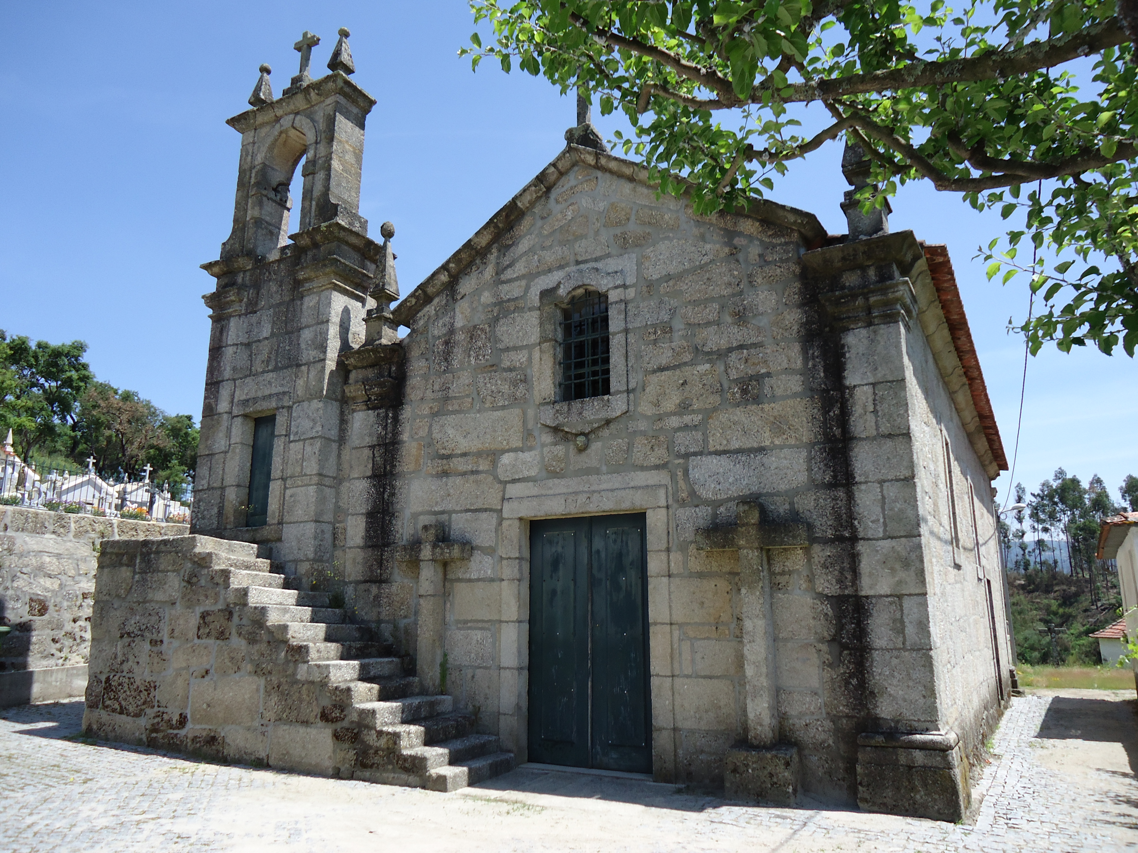 Igreja Velha de Várzea do Douro This file was uploaded for Wiki Loves Monuments in Portugal with the unique identifier 11871408.